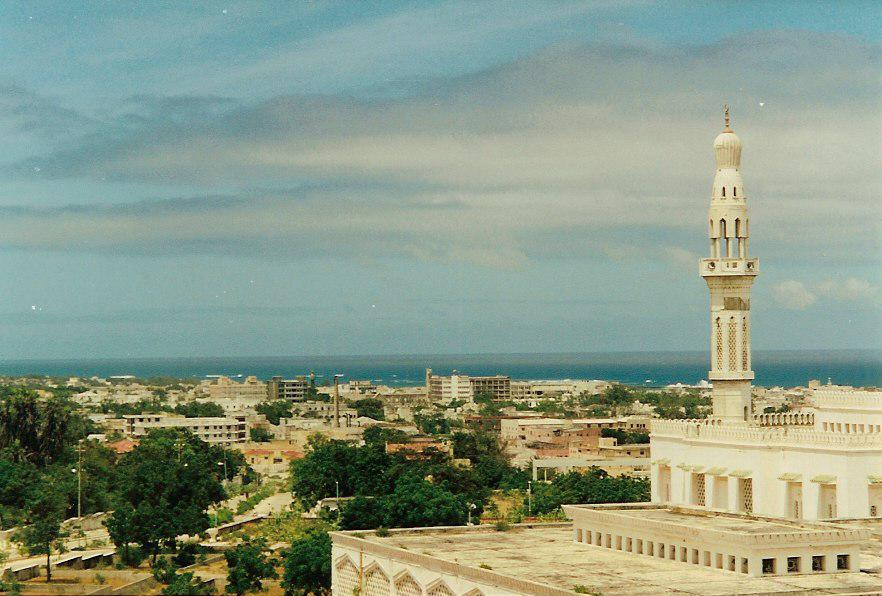 Isbaheysiga Mosque in Mogadishu.